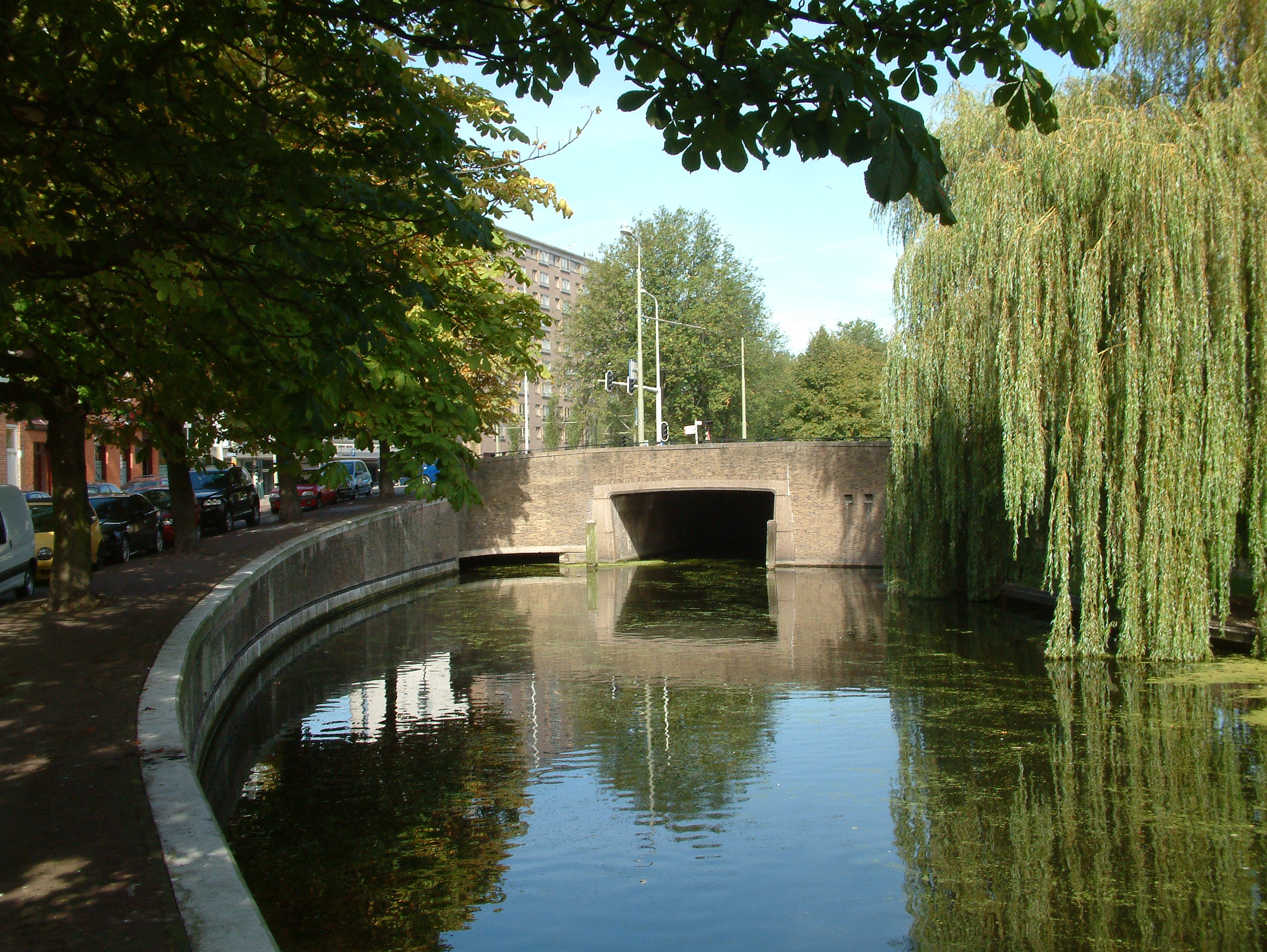 Brug in Den Haag